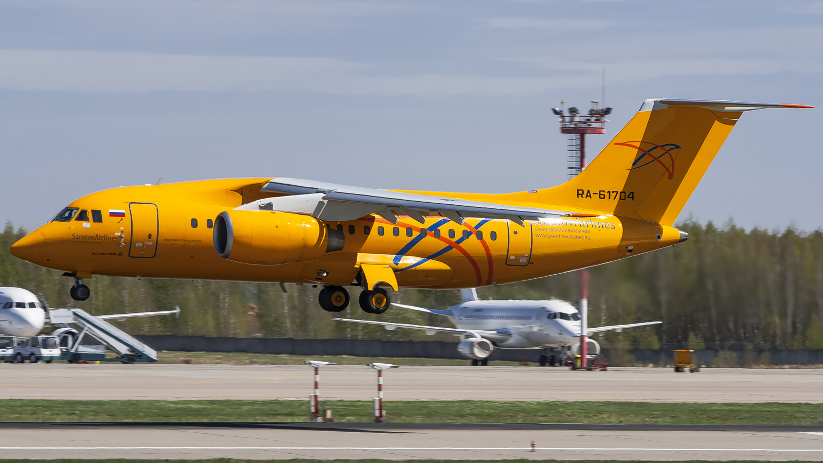 RA-61704 Antonov 148-100V Saratov Airlines DME | UUDD